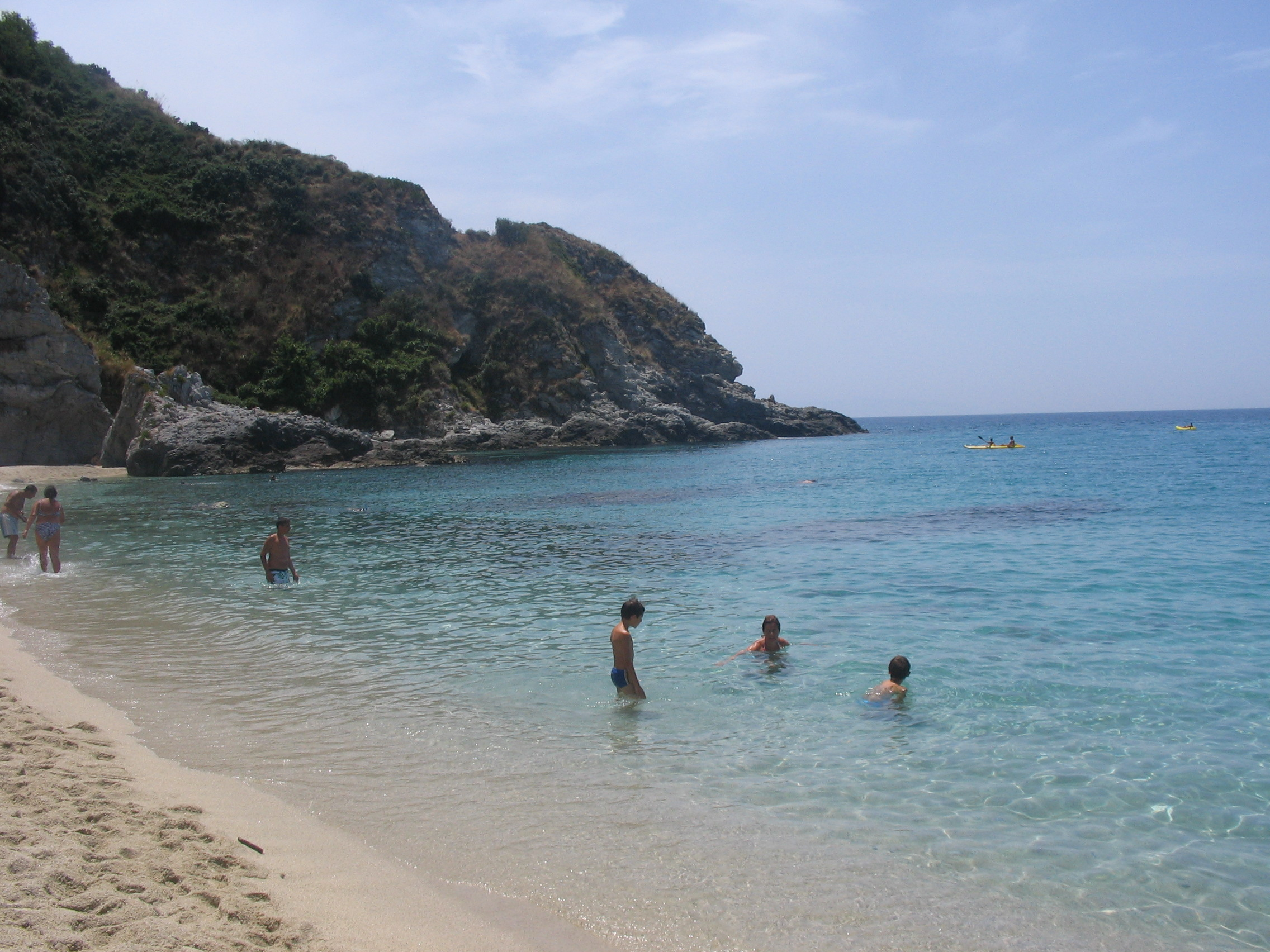 Grotticelle beach, Ricadi, Calabria, Italy